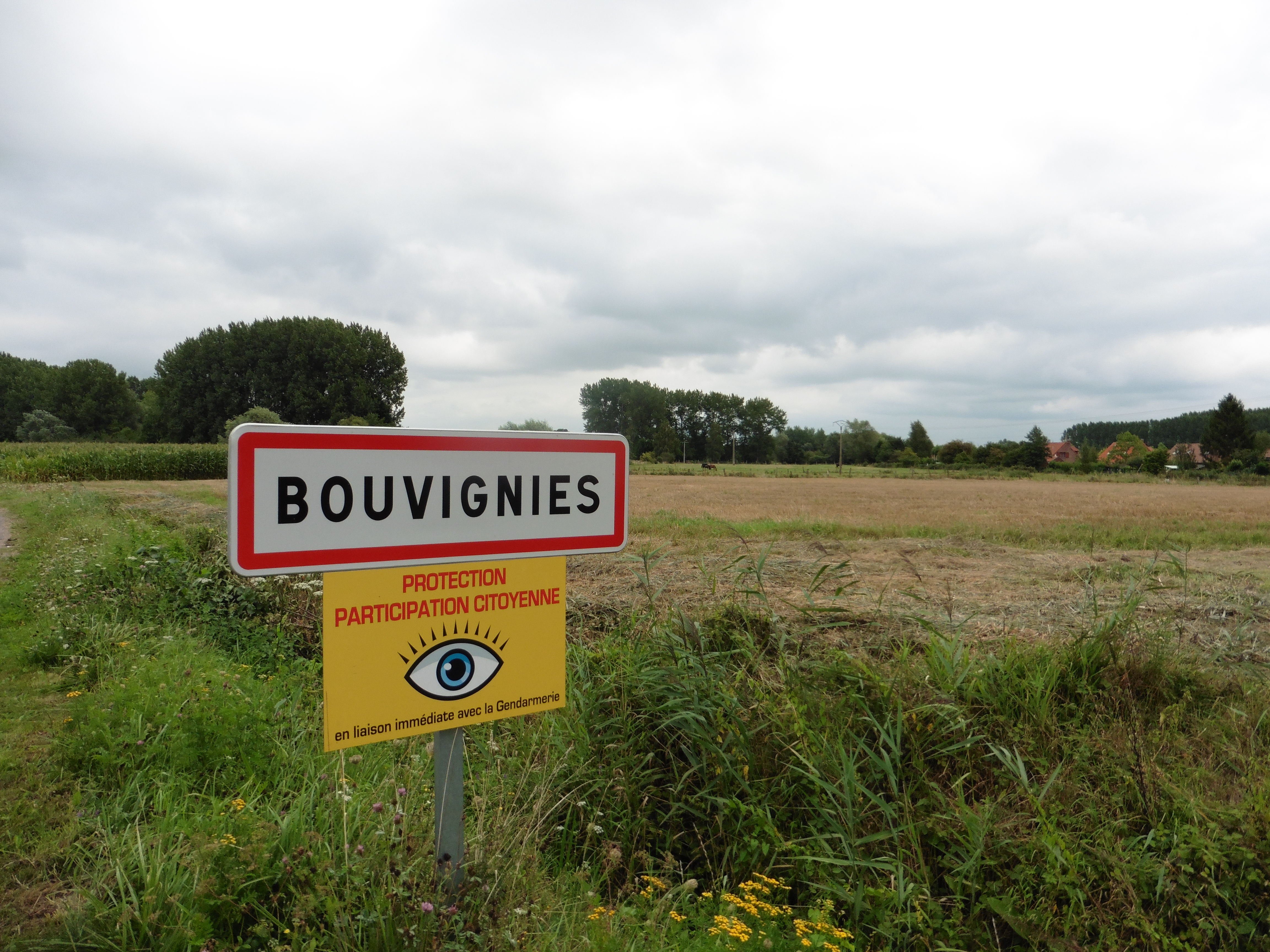 City limit de Bouvignies (Nord) dans le Nord région Nord-Pas-de-Calais France.